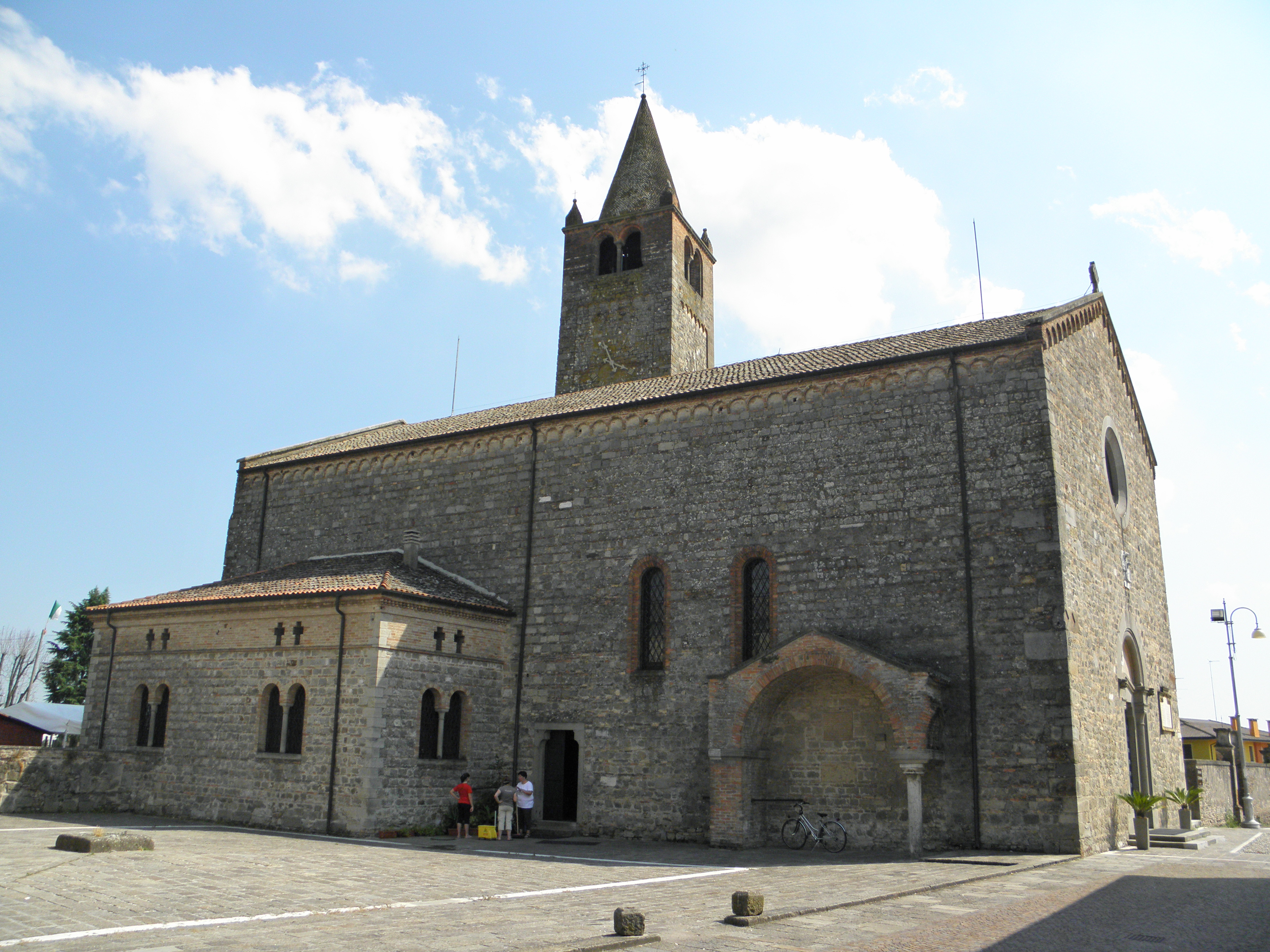 Carrara Santo Stefano, frazione di Due Carrare: la chiesa di Santo Stefano primo martire, già parte dell'abbazia benedettina di Santo Stefano di Carrara.